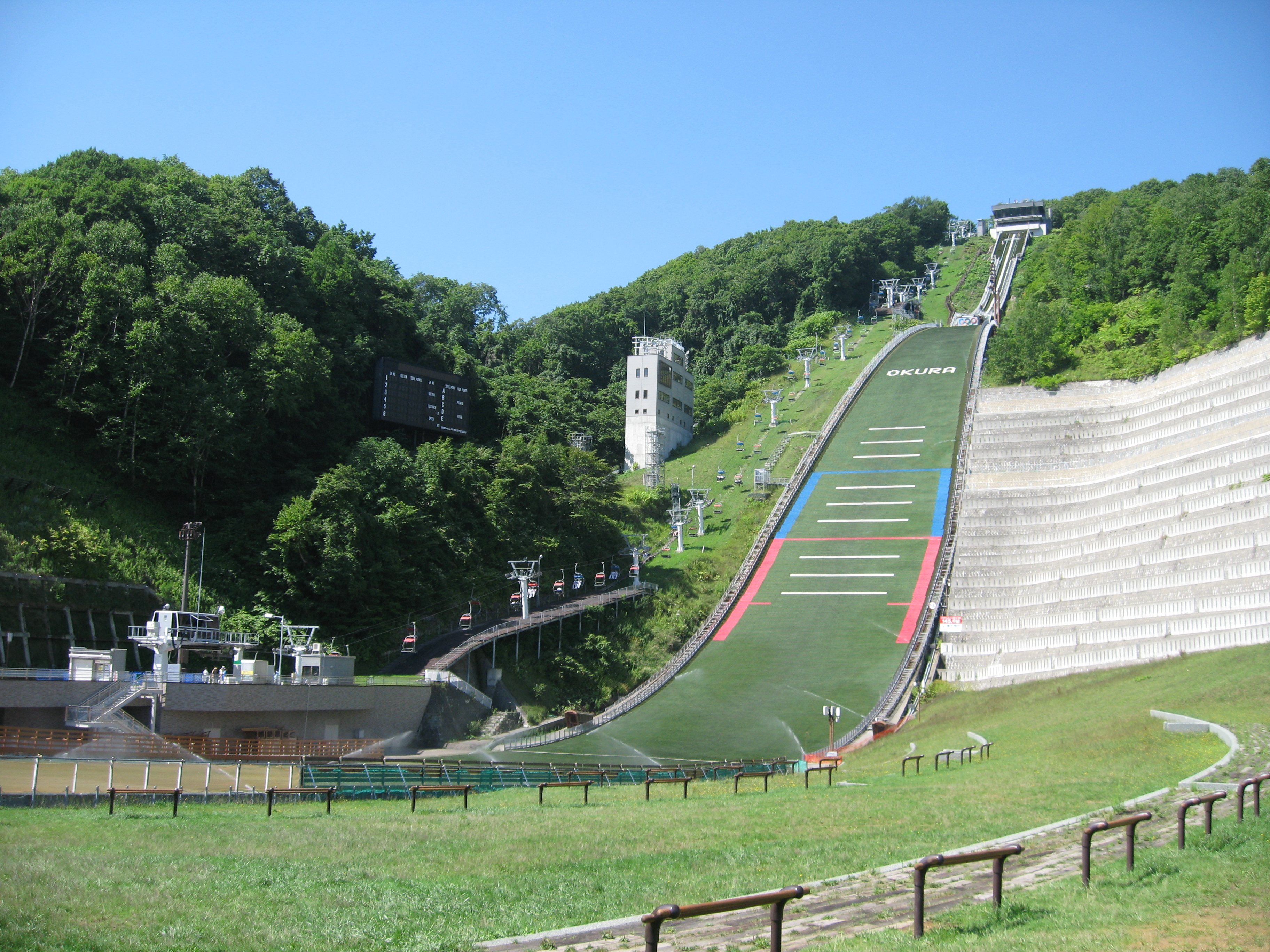 中文（香港）: 日本北海道札幌市宮之森跳台競技場